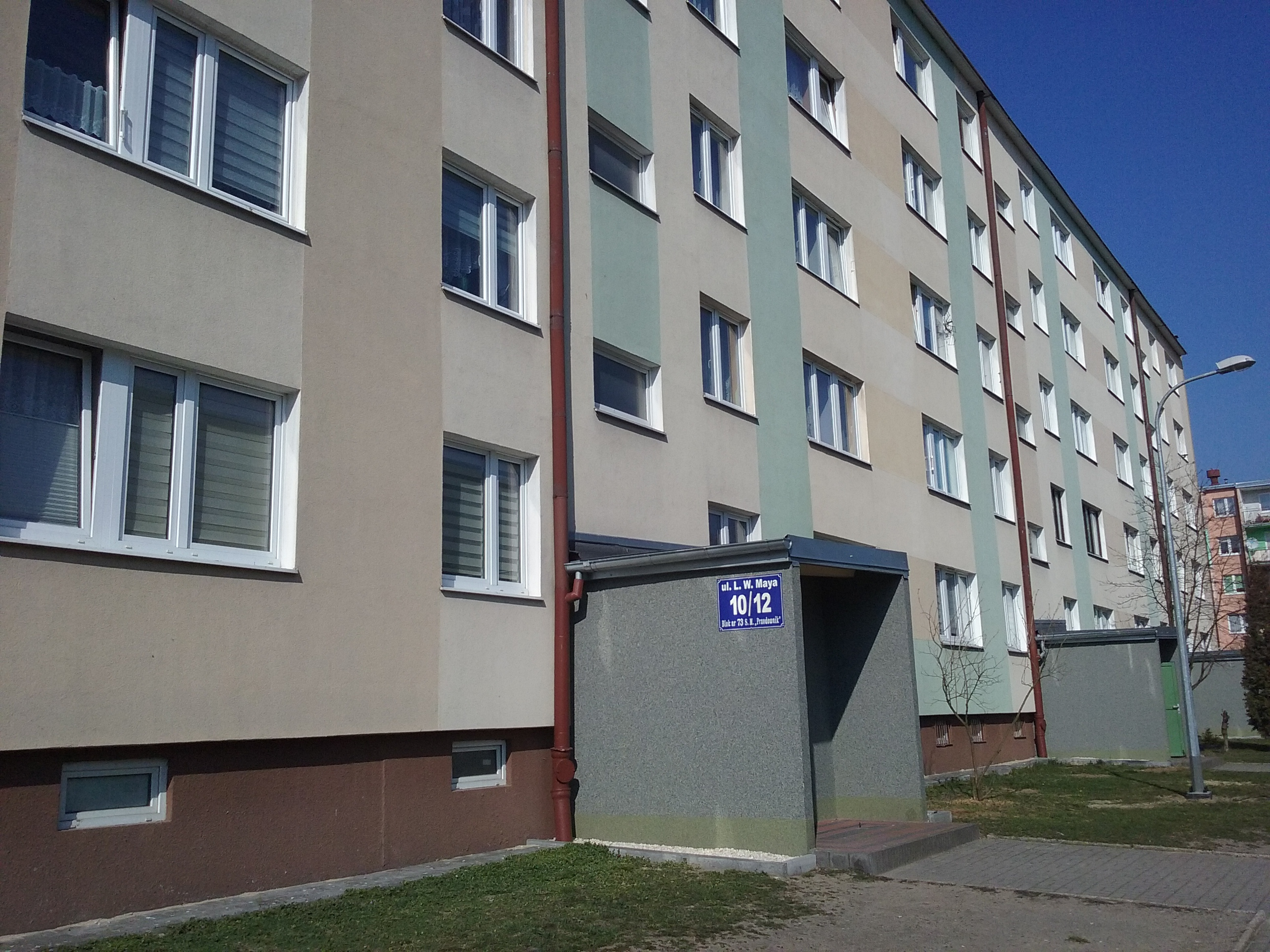 Jeden z bloków mieszkalnych w Tomaszowie Mazowieckim przy ul. Leona Maya pastora luterańskiego, profesora tomaszowskich szkół zamordowanego przez Niemców w Dachau